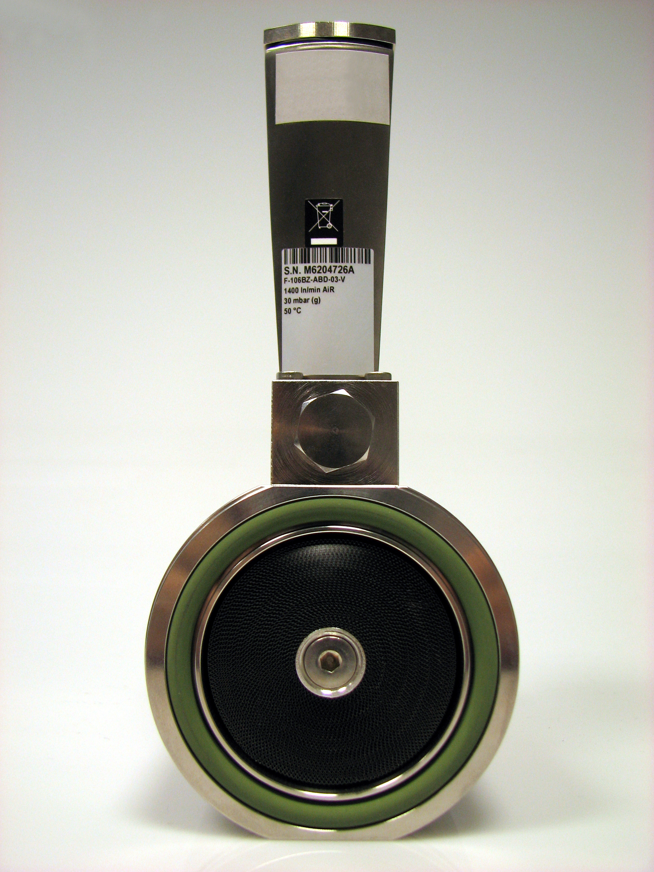 Einlassseite eines Luftmassenmesser, Intlet of a air flow meter